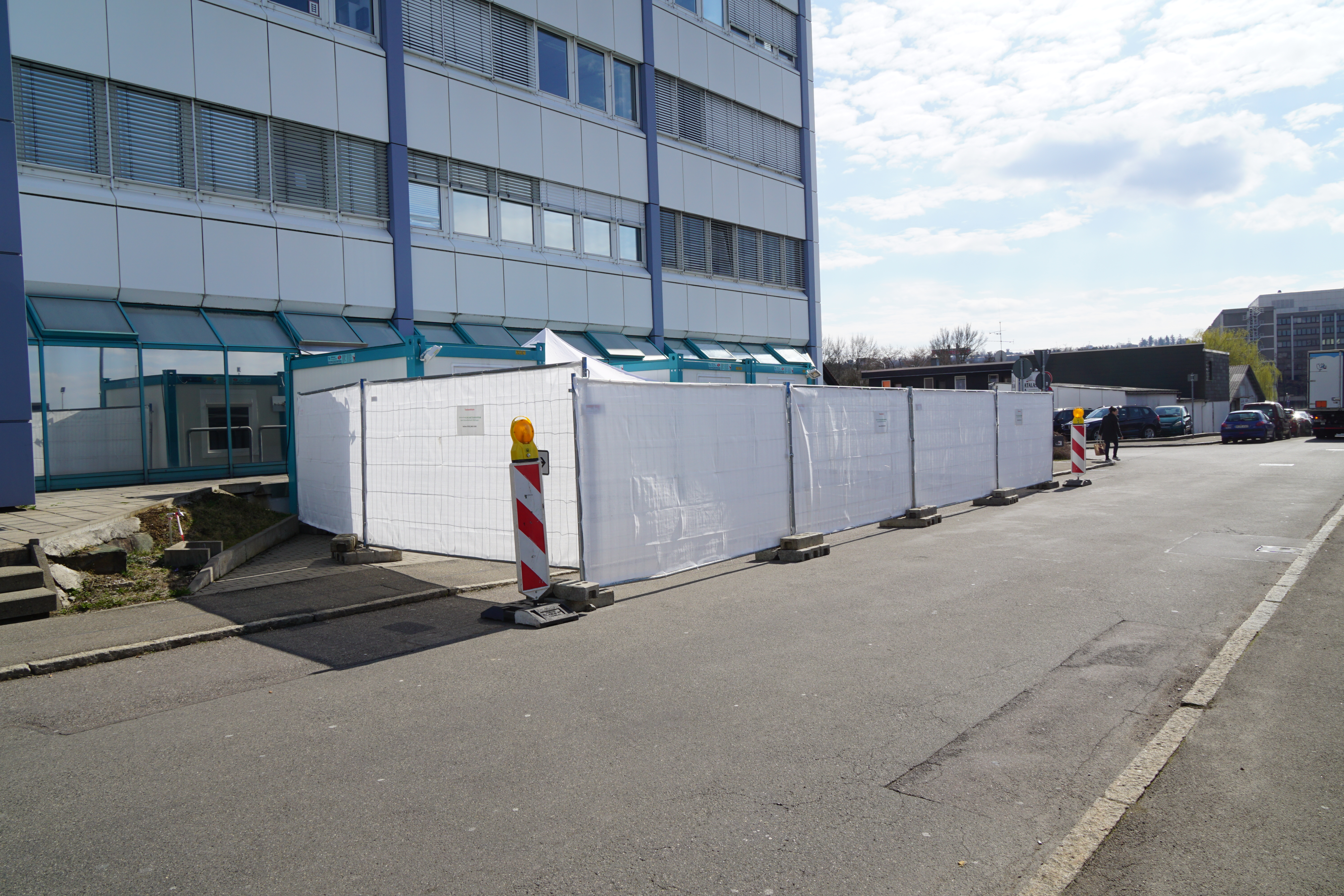 Corona-Testzentrum Sindelfingen im Vogelhainweg. Zur Verhinderung der Einschleppung von Erregern in die Räume des Labors findet die Probenentnahme zu beschränkten Zeiten in einem offenen Zelt statt. Für einenen Test muss telefonisch mit dem Gesundheitsamt ein Termin ausgemacht werden, ohne Termin kein Test. Getestet werden vorzugsweise Patienten mit Symptomen oder Personen, die engen Kontakt zu einer positiv getesteten Person hatten..